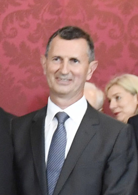 Am 3. Juni 2019 wurde Mag. Alexander Schallenberg als Bundesminister für Europa, Integration und Äußeres angelobt. Foto: Mahmoud